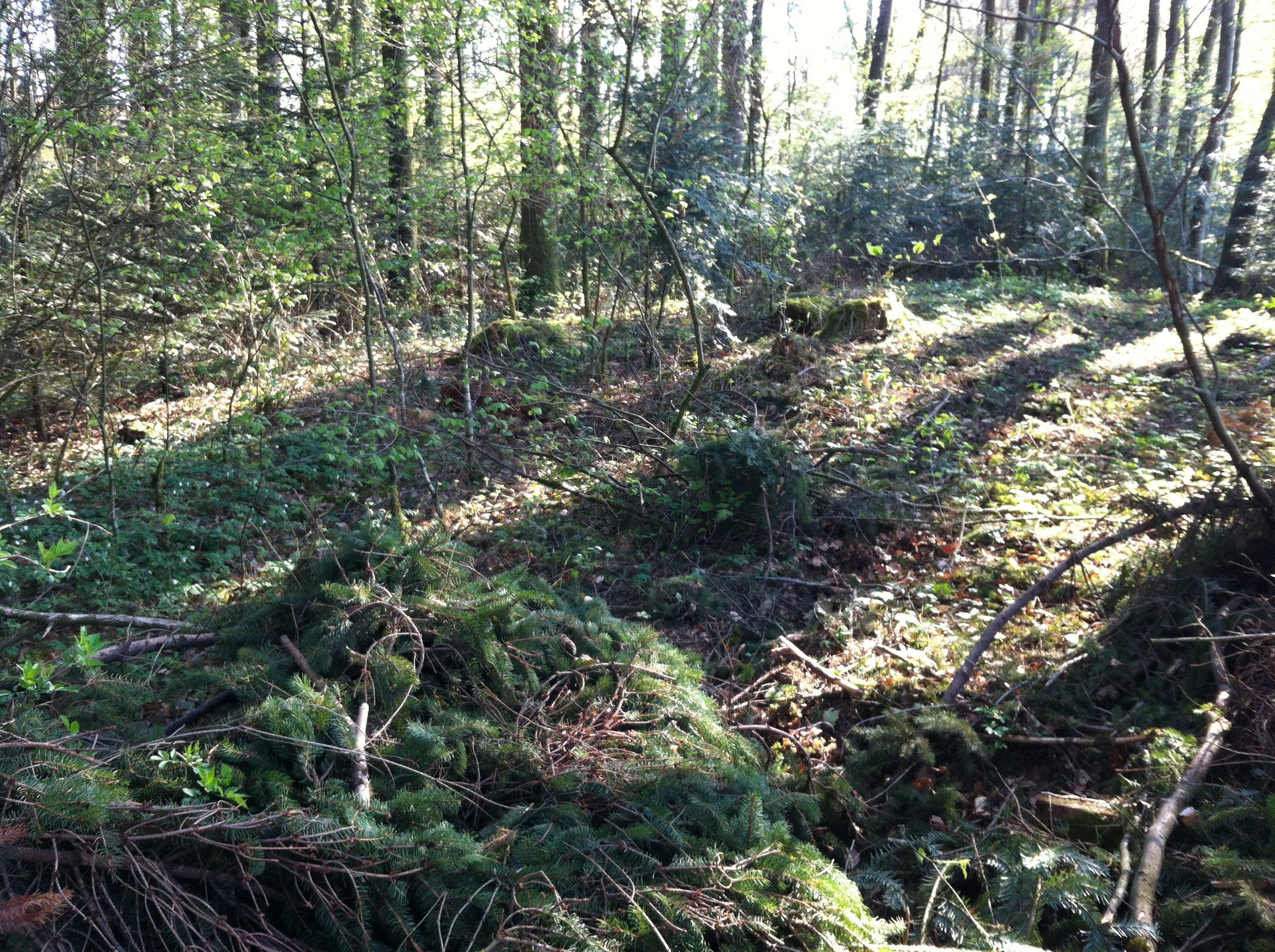 Bronzezeitlicher Grabhügel (unter Denkmalschutz) am Wiggenberg nahe dem Gewerbegebiet bei Oberlauchringen, Ortsteil der Gemeinde Lauchringen im Landkreis Waldshut in Baden-Württemberg. Ein noch unausgegrabener Hügel im Rahmen eines größeren, teils erforschten Gräberfeldes. Befunde der Hallstattzeit und Hinweise auf eine schon frühere Belegung in der mittleren und ausgehenden Hügelgräberbronzezeit.